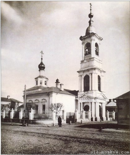 a historical photo of the Arbat Street in Moscow / Церковь Николая Чудотворца в Плотниках на Арбате